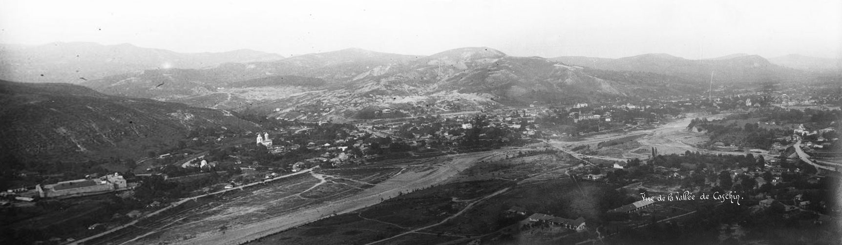 Panoramă a orașului Târgu Ocna compusă din două fotografii făcute în 1917. De remarcat greșeala localizării (Valea Cașinului în loc de Valea Trotușului).